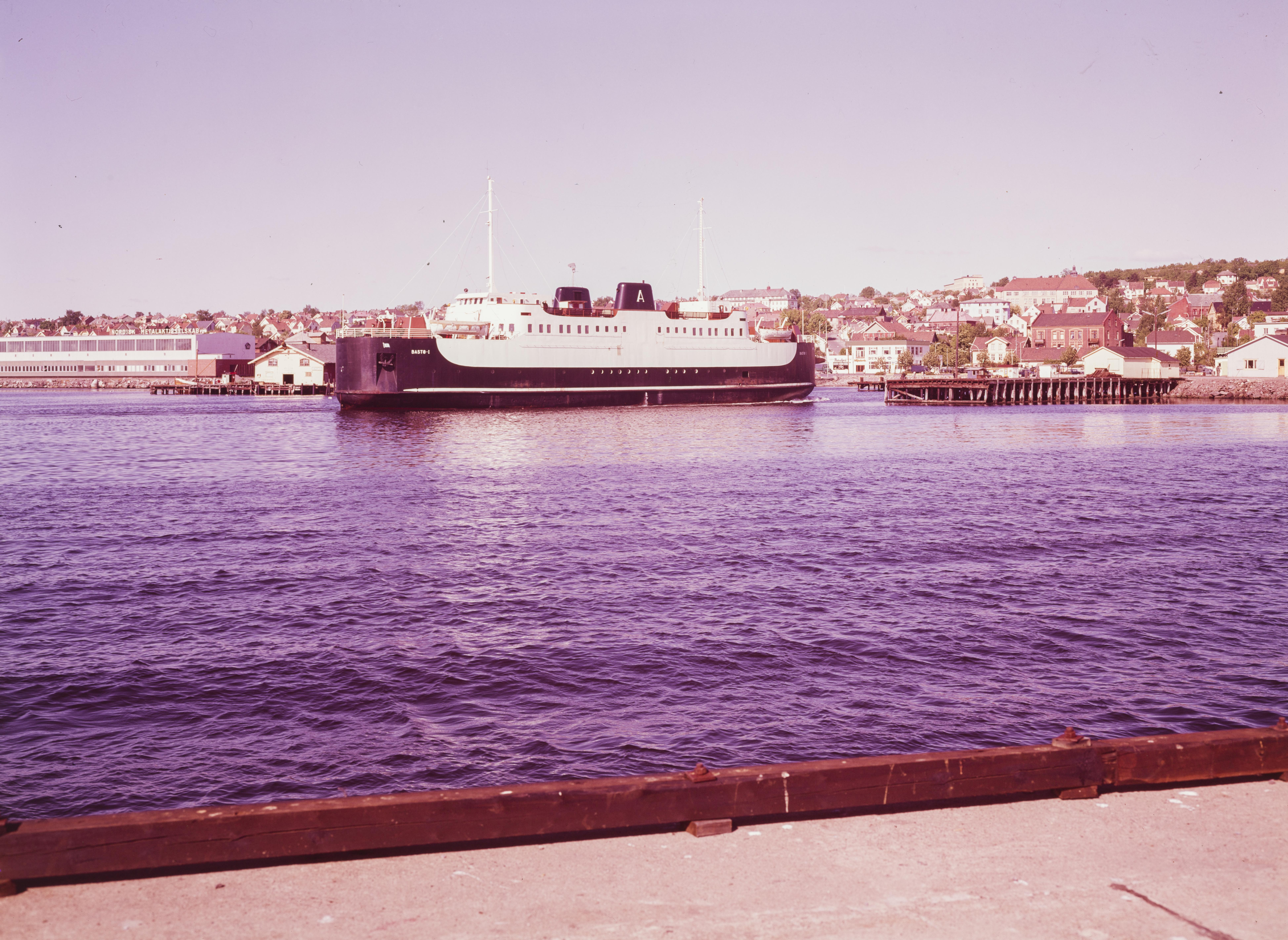 Bildet er hentet fra Nasjonalbibliotekets bildesamling. Anmerkninger til bildet var: Tittel er hentet fra emballasje. Horten, Horten, Vestfold